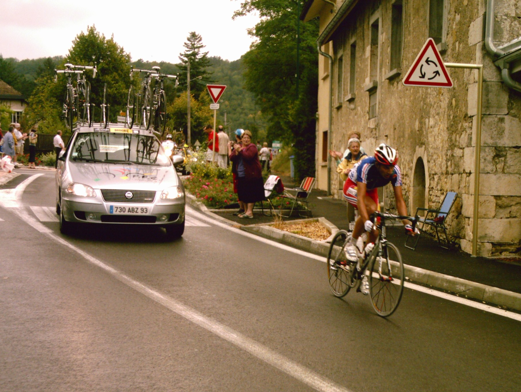 Yoann Bagot au passage dans la commun de Thoirette pendant son échappée lors de la deuxième étape du Tour de l'Ain 2009.